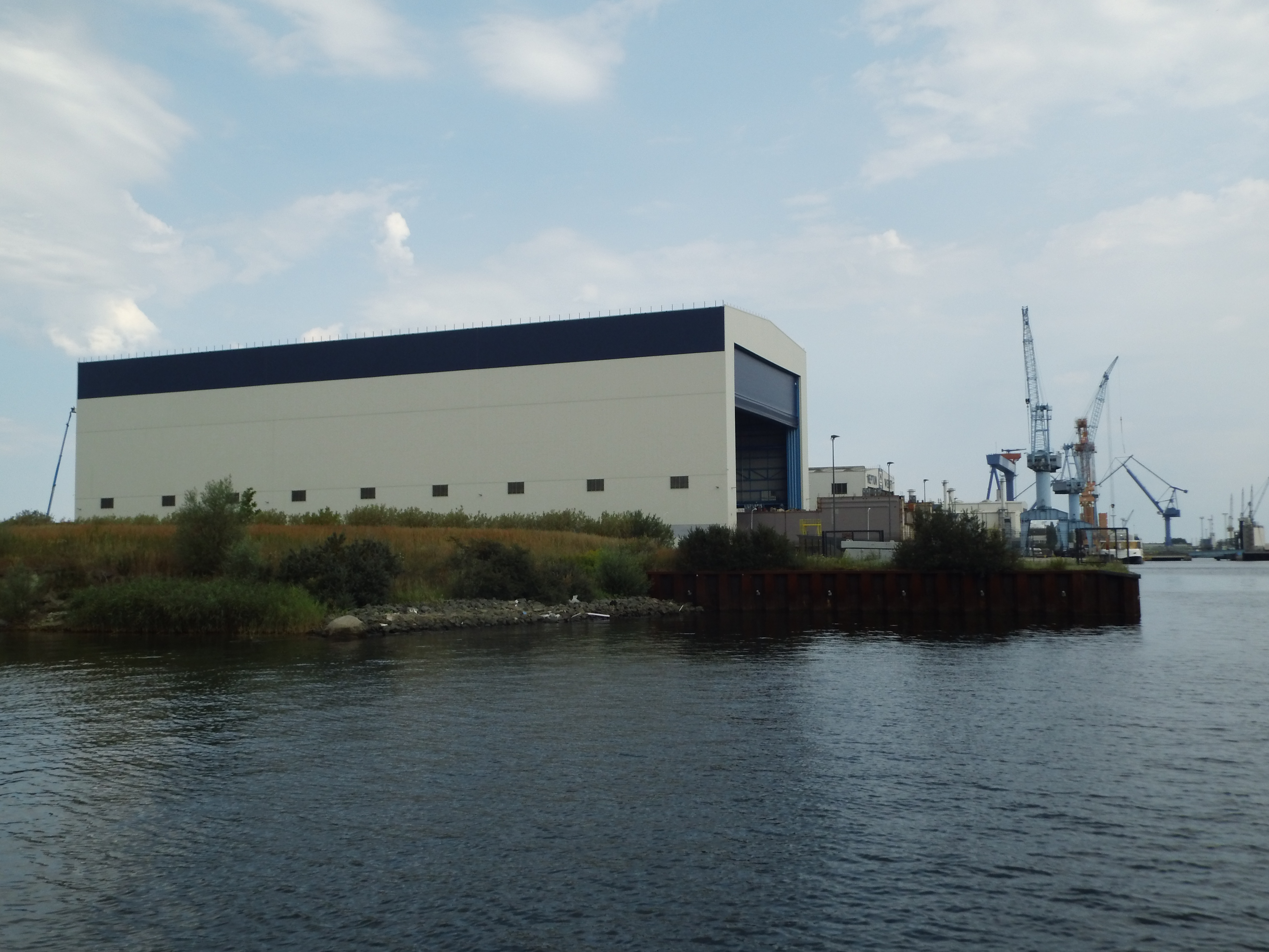 Neptun Werft new hall. Norwegian Encore under construction.